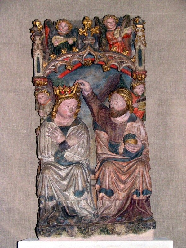 Asti, Chiesa di Santa Maria di Viatosto: interno, statua dell'incoronazione di Maria (arte astigiana, XV secolo).